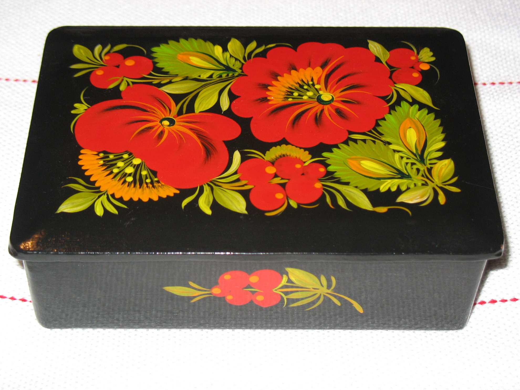 Скринька дерев*яна з петриківським розписом по чорному тлу. Приблизно 1985 р. УРСР.